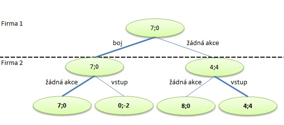 Rozšířená forma hry - Konflikt dvou firem - Firma1, Firma2 Modifikace příkladu z publikace: DLOUHÝ, Martin; FIALA, Petr. Úvod do teorie her. 2.přepracované vydání. Vysoká škola ekonomická v Praze : Nakladatelství Oeconomica, 2009. 120 s. ISBN 978-80-245-1609-7.